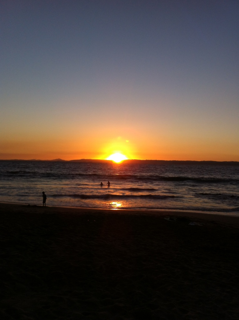 Este es uno de los puntos turísticos mas visitados en la Región del Bío Bío